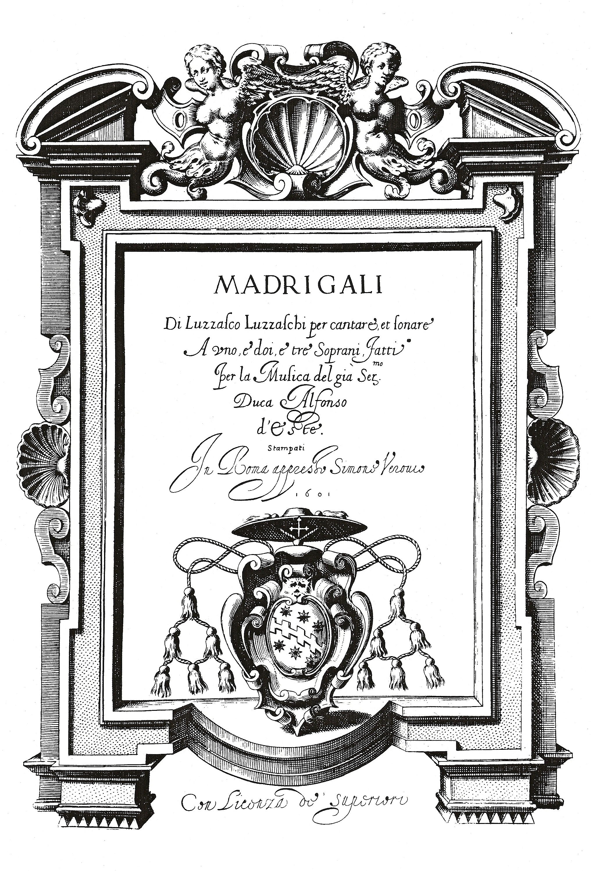 Title page of Luzzascho Luzzaschi's